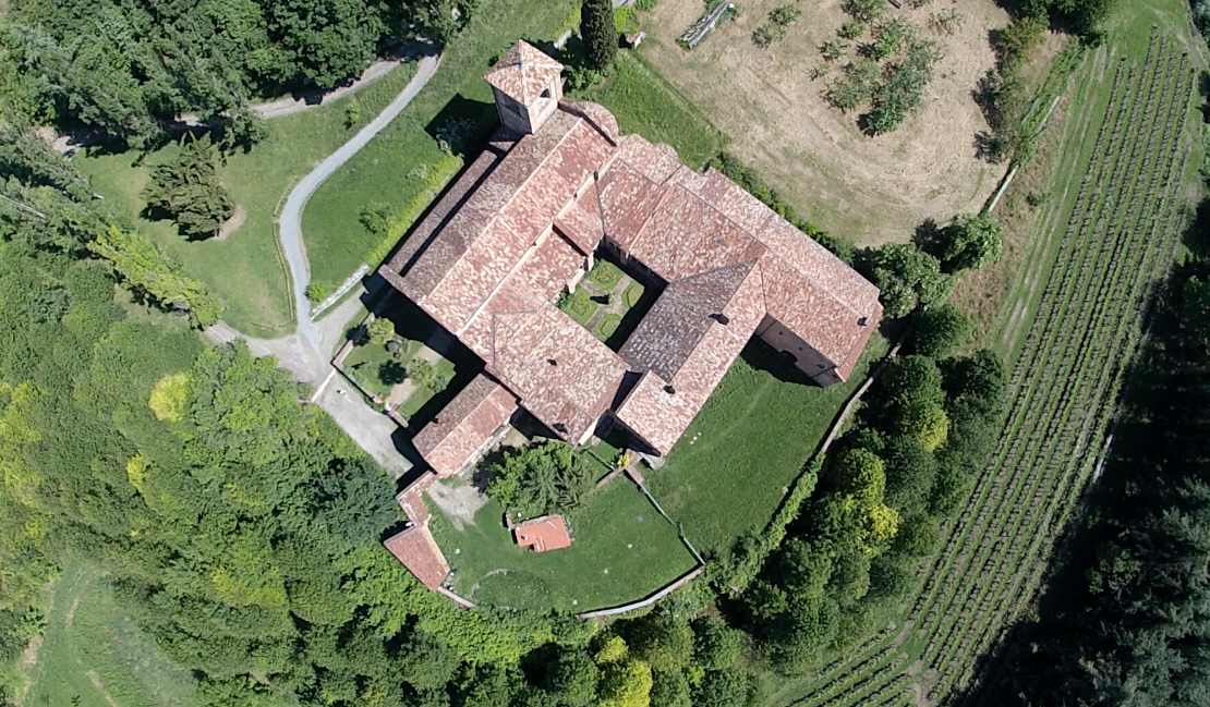 aerea This is a photo of a monument which is part of cultural heritage of Italy.